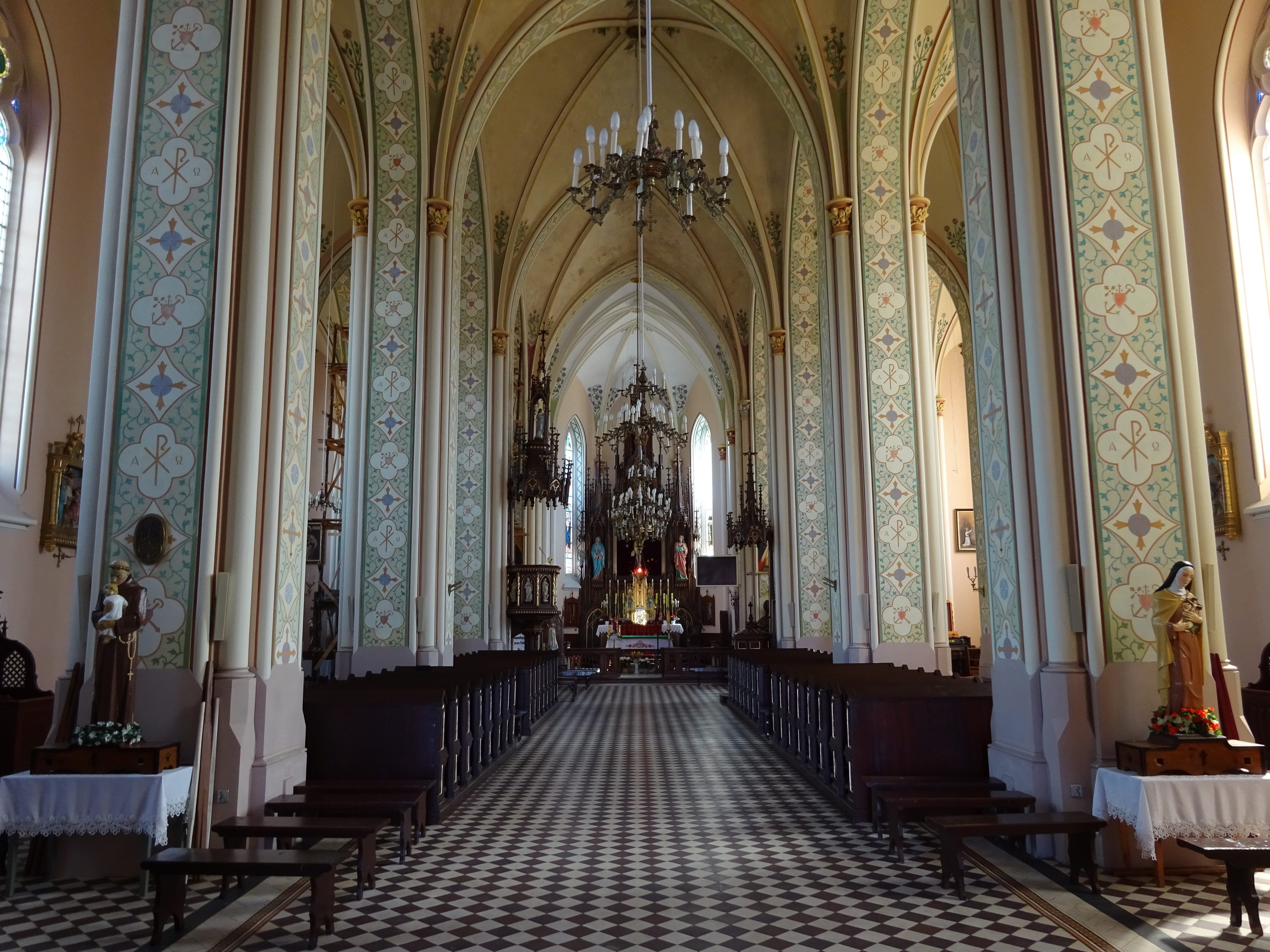 Kościół Niepokalanego Poczęcia Najświętszej Maryi Panny w Czarni - nawa główna